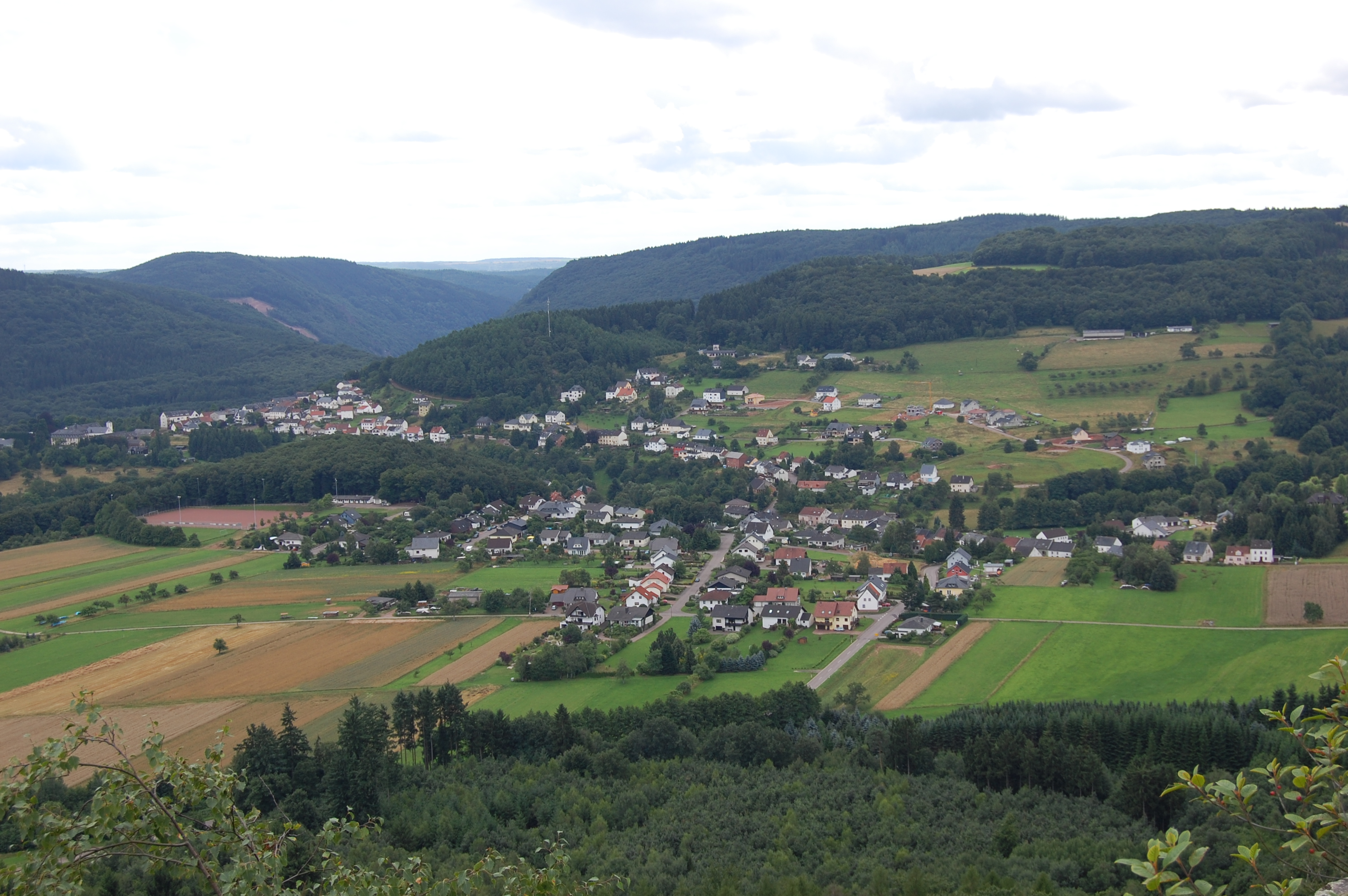 Taben-Rodt vom Aussichtspunkt "Auf Maunert" fotografiert (2008)